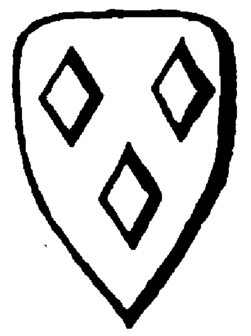 Wappen der Edelfreien von Dornberg